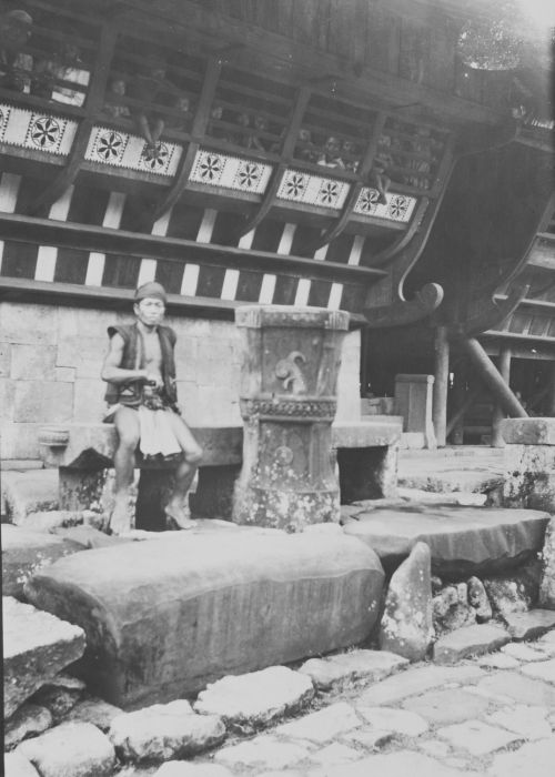 foto. Een man zit op de megalieten voor een adathuis op Nias, met achter de vensters van het huis toekijkende kinderen en volwassenen